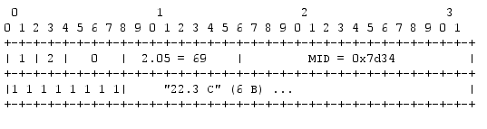 CoAP Reply